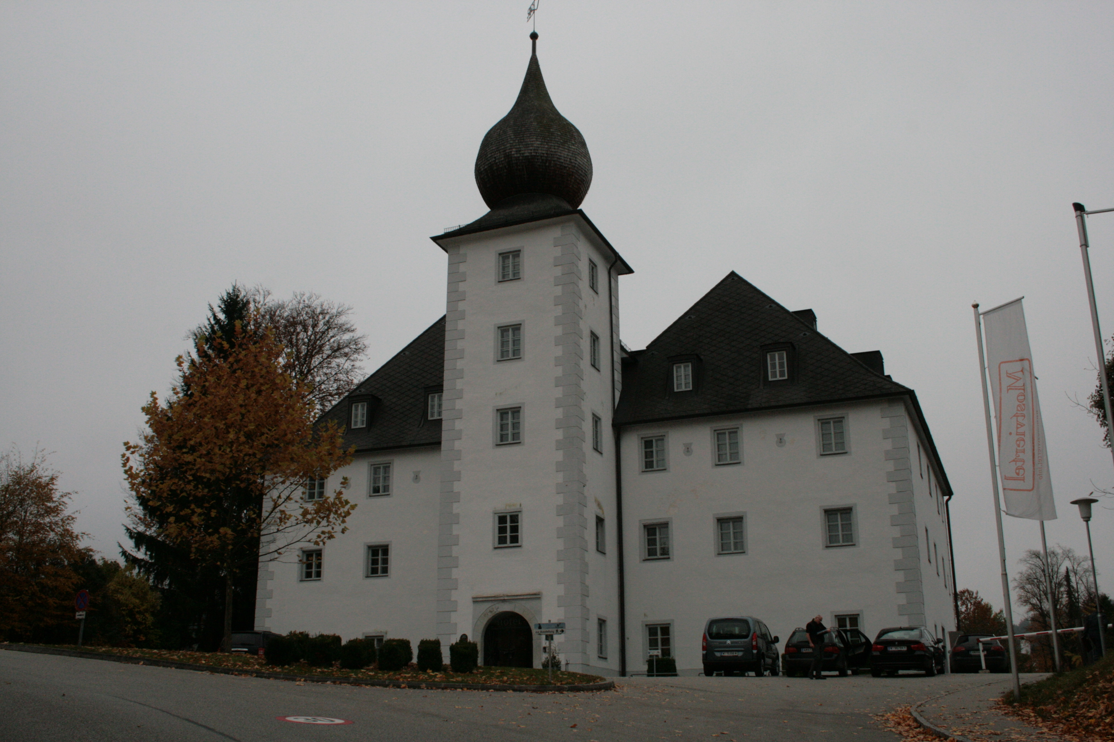 Schloss Zell/ Oberzell